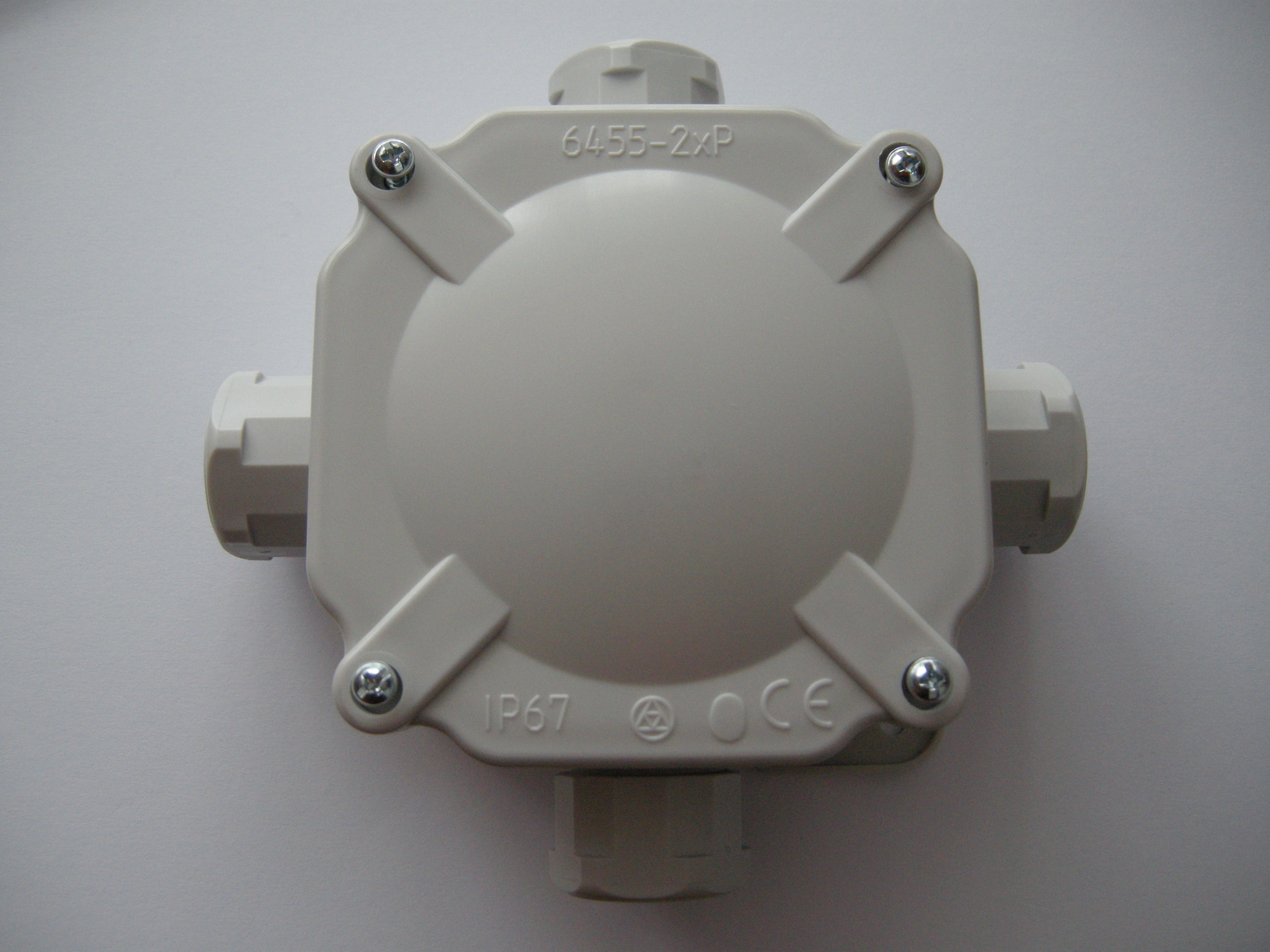 Puszka hermetyczna natynkowa IP67